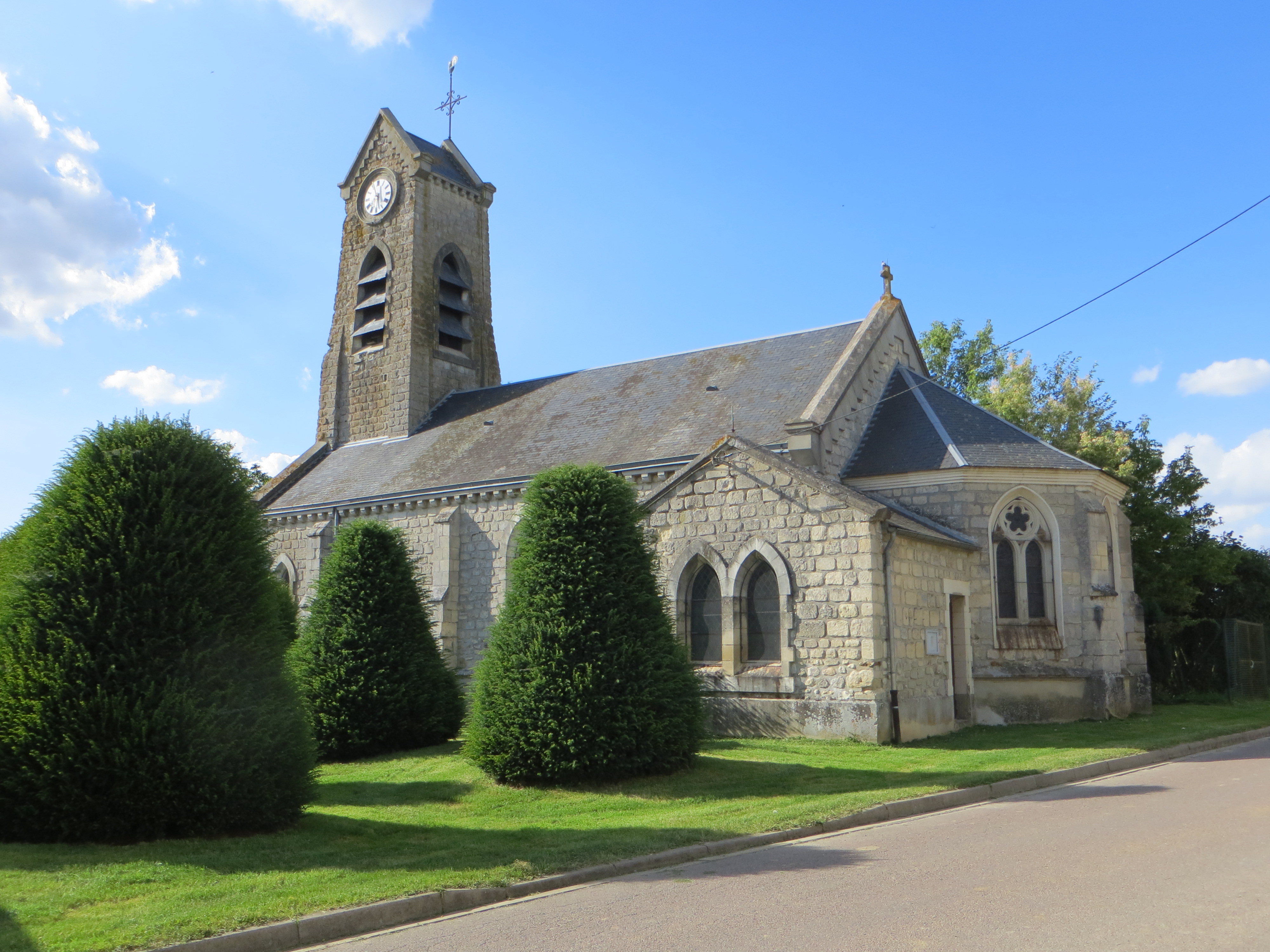 Vue générale de l'église